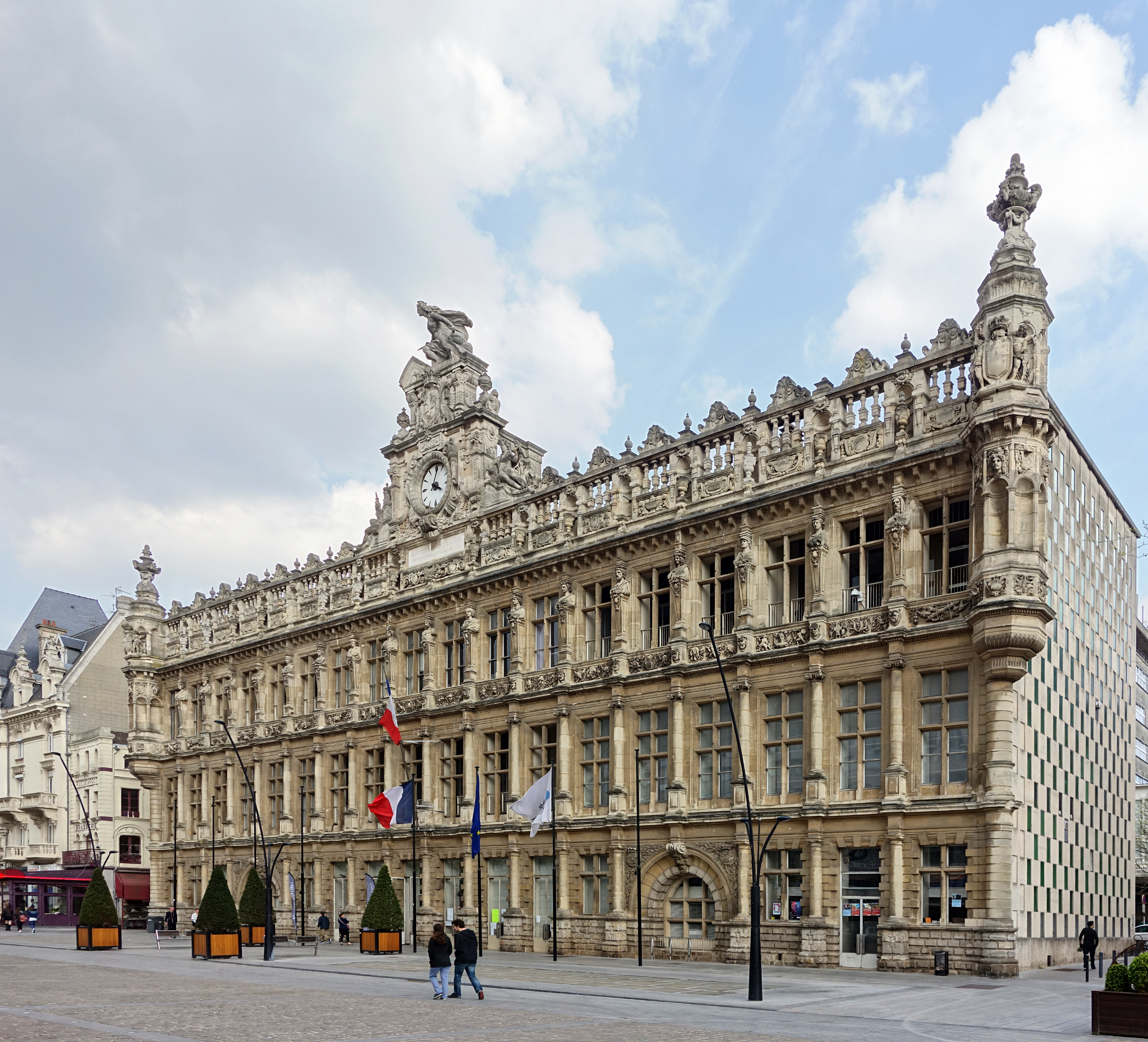 L'Hôtel de ville de Valenciennes.